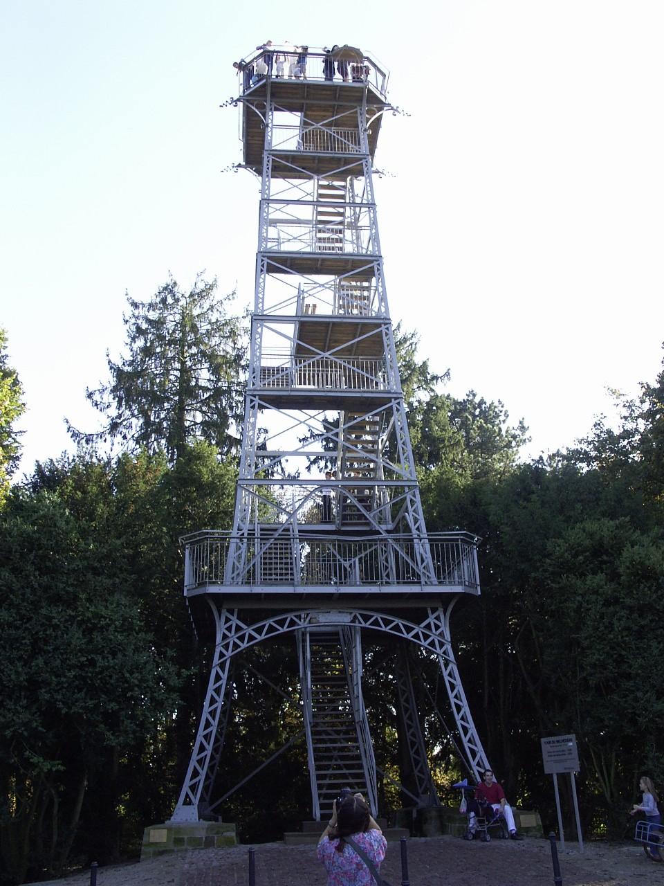 La Tour du Belvédère de Mulhouse près du zoo, construite en 1897.